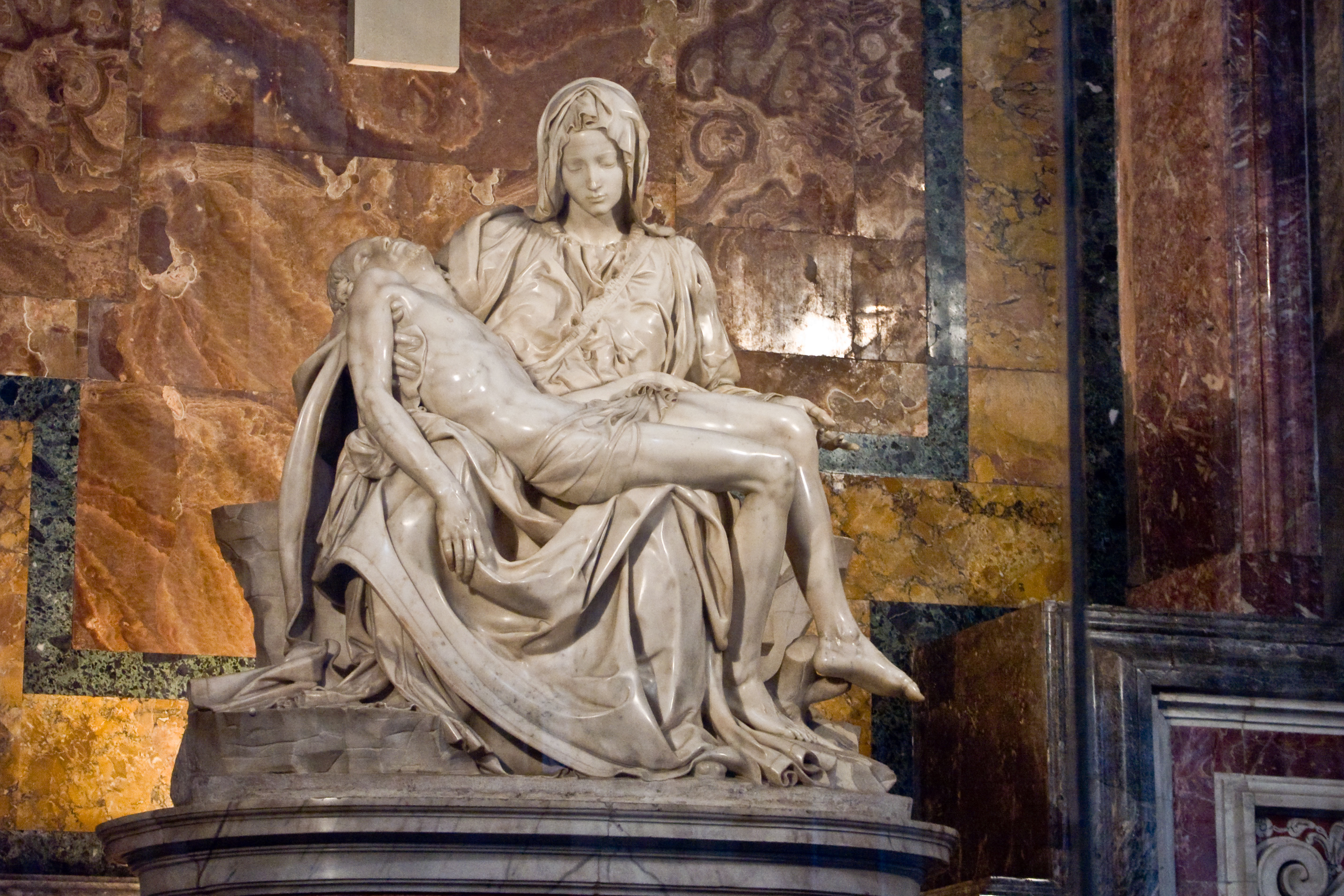 La pieta de Michel Ange